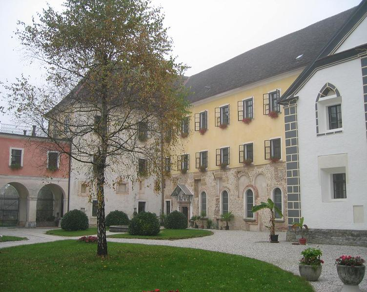 Cistercijanski samostan v Stični.